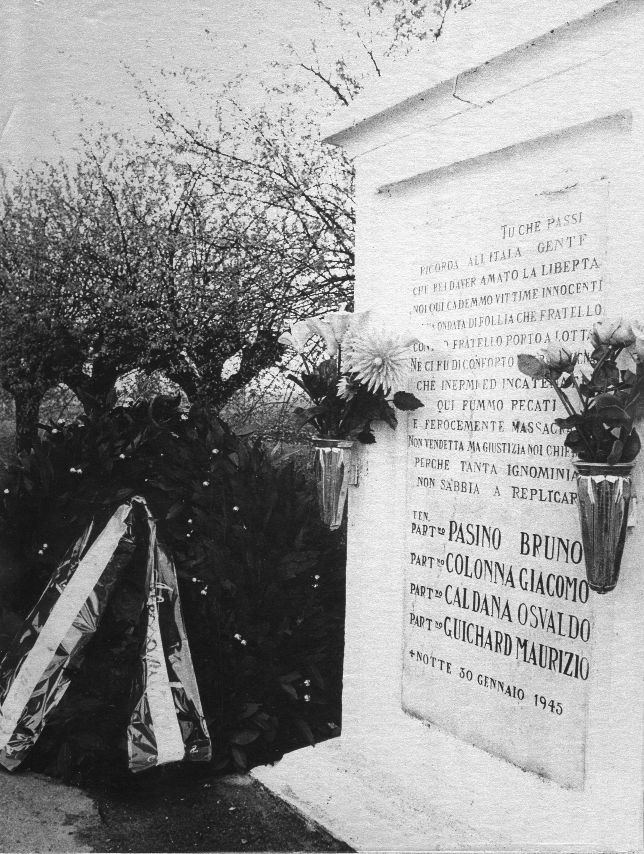 Lapide che ricorda l'eccidio delle ore 01 del mattino del 31 gennaio 1945 con la scritta voluta dal primo Prefetto dopo la Liberazione On. Livio Pivano.